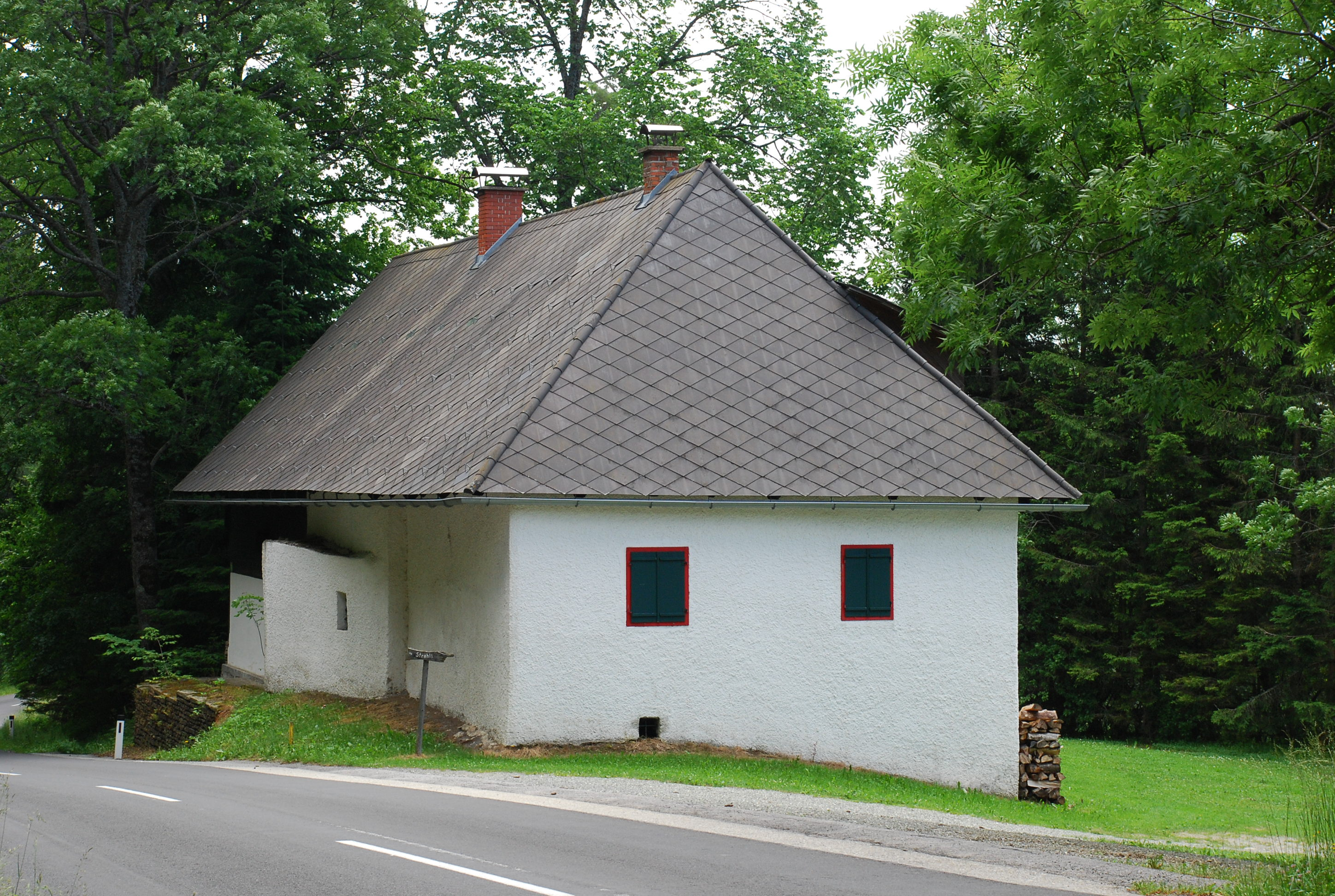 Wohngebäude vlg. Strehly in Rettenbach